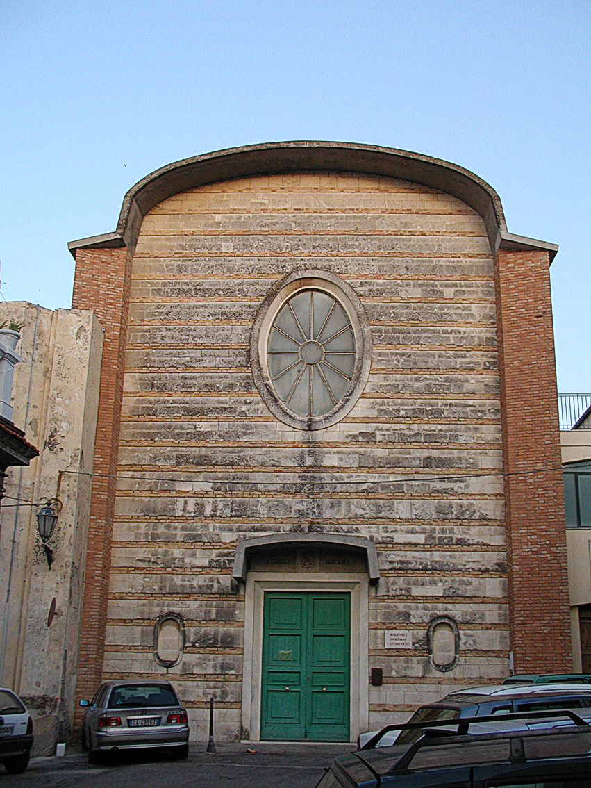 Biblioteca diocesana di Ortona